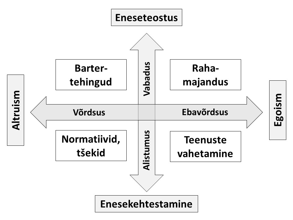 Rahasüsteemid sotsiaalse korra mudelis